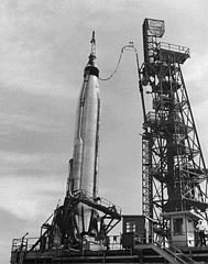 MA-8 [SIGMA 7] DURING SIMULATED LAUNCH ACTIVITIES AT LAUNCH COMPLEX 14